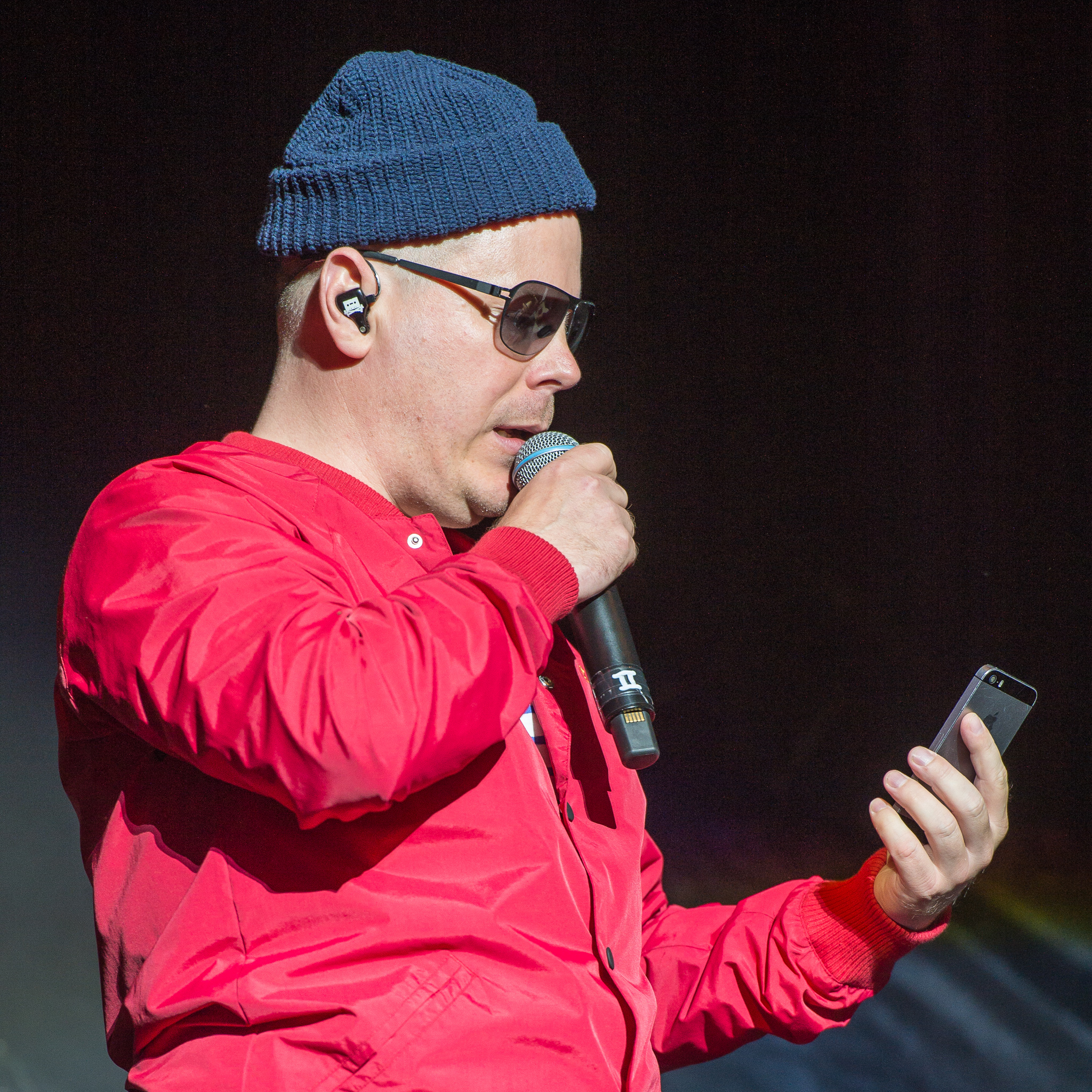 ARGO-Konzerte,Beck's Park Stage,Boris Lauterbach,Festival,Fettes Brot,Konzert,König Boris,Livekonzert,Livemusik,Musik,RiP,Rock im Park 2016